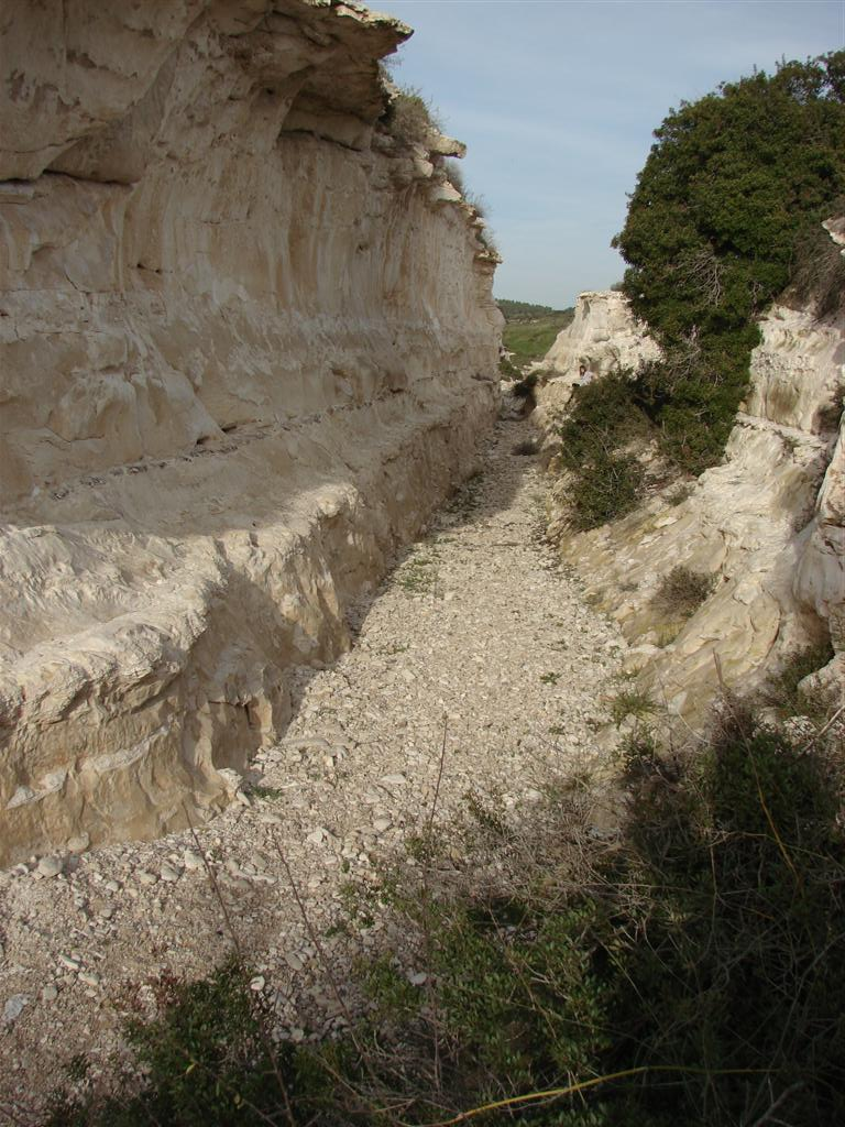 החציבה בנחל אדוריים